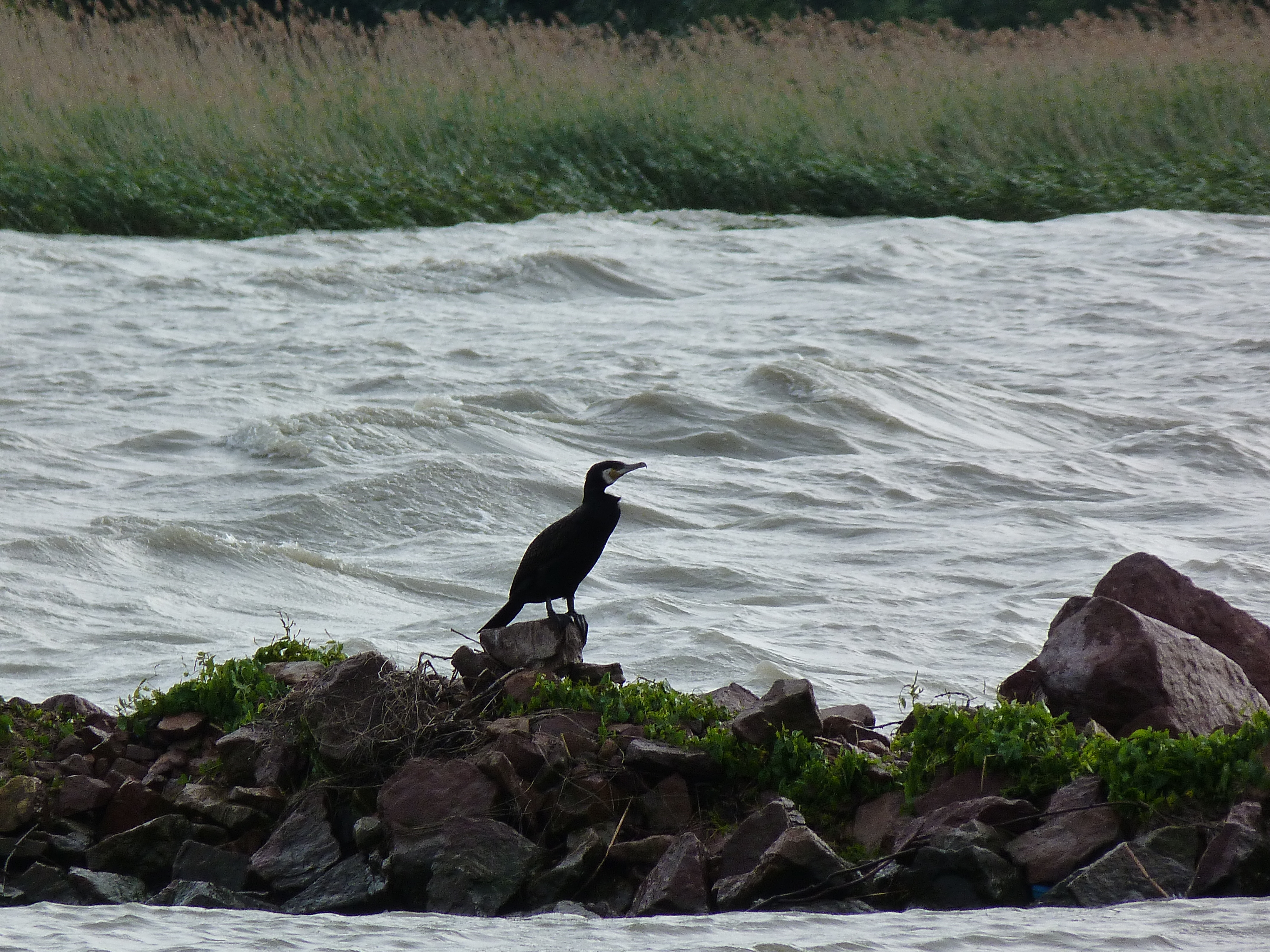 A felvétel 2013. Május 23 –án csütörtökön készült Balatonmáriafürdőn. Kárókatona a Kikötőben. ©© Published under Creative Commons in the Metapolisz DVD line. All of the photos and vids in the Metapolisz DVD line are under Creative Commons and can be used even for commercial – for profit – purposes. Recommended Citation Derzsi Elekes Andor: Metapolisz DVD line